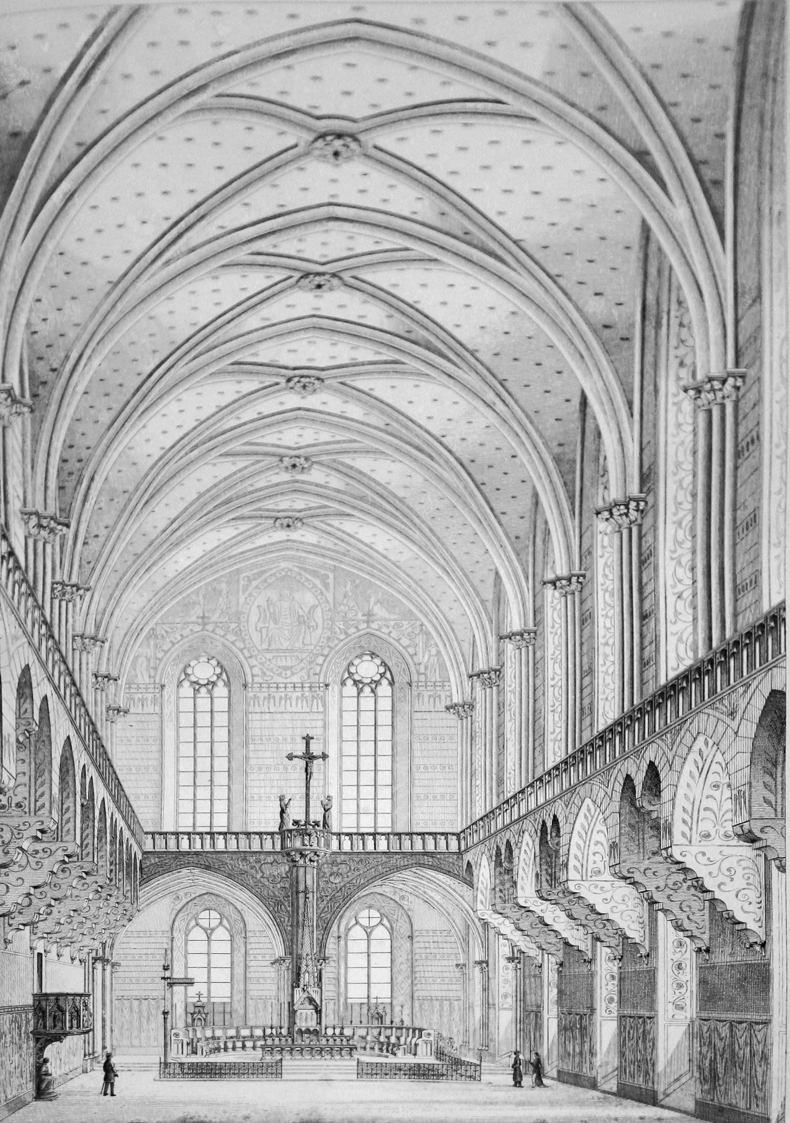 Projet Viollet-le-duc pour grande chapelle avec destruction des voûtes de la Grande Audience - Palais des Papes, Avignon, Vaucluse, France